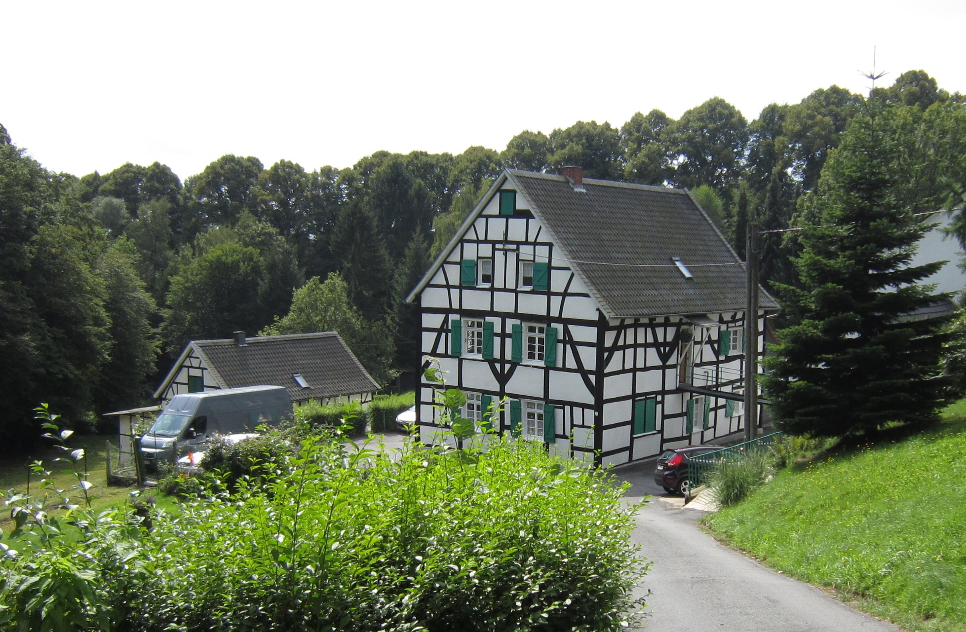 Hof Mummenscheid